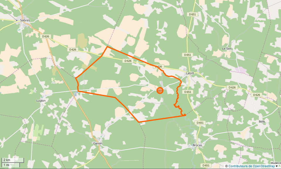 Vert (Landes) Limite communale This map may be incomplete, and may contain errors. Don't rely solely on it for navigation.